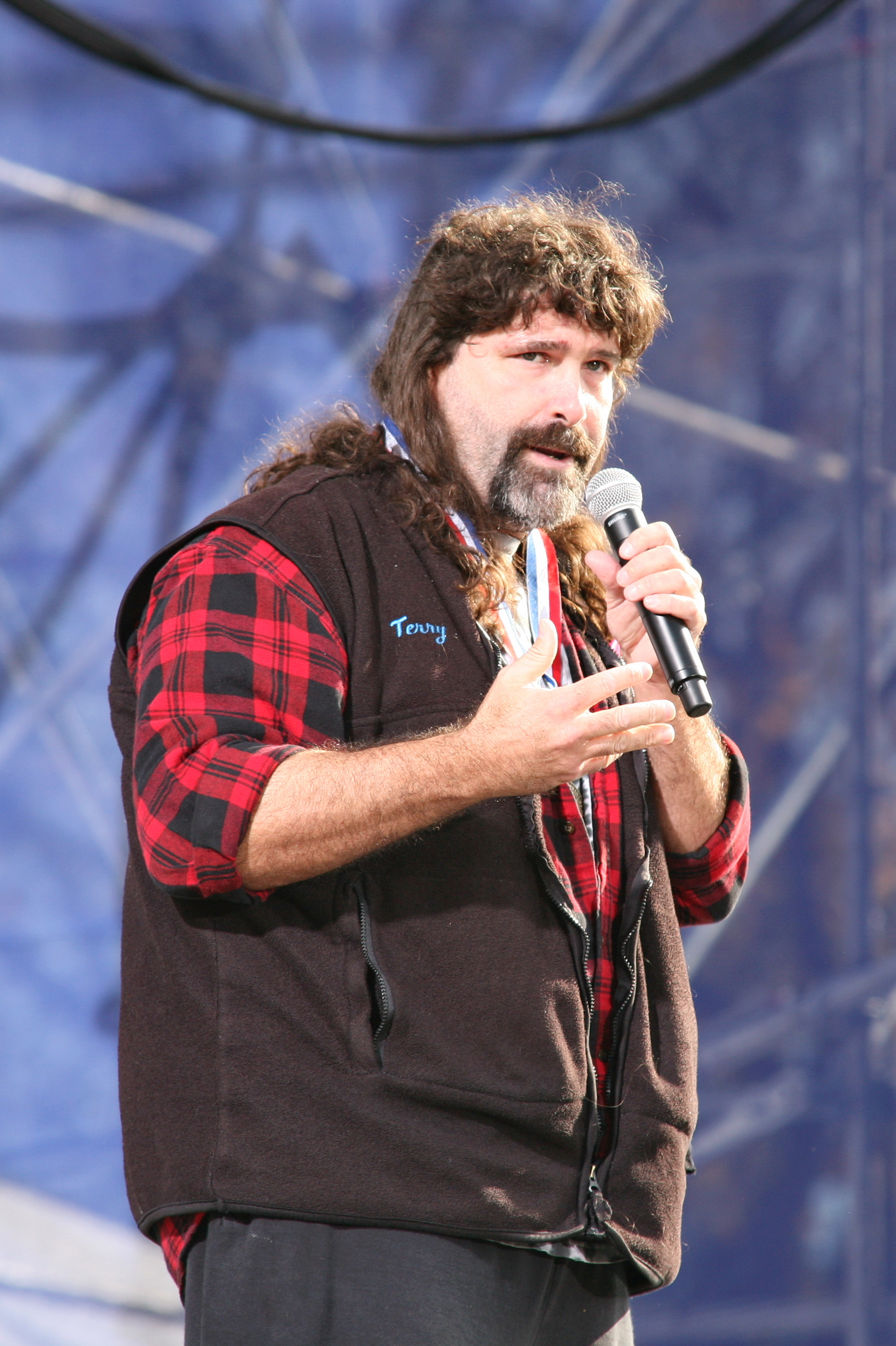 Mick Foley "Mankind". Cette photo a été prise le 30 octobre 2010 avec un Canon EOS 5D.